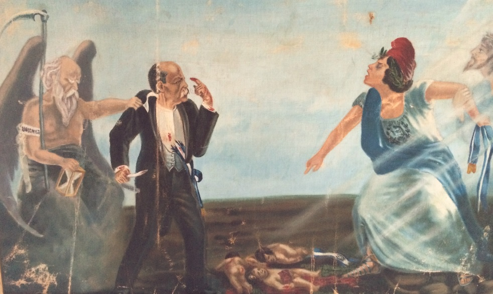 El tiempo de Cabrera ha llegado: el Partido Unionista se lo lleva despues de destrozar Guatemala, mientras que Cristo le recuerda a Guatemala que debe perdonar. Museo Nacional de Historia de Guatemala.